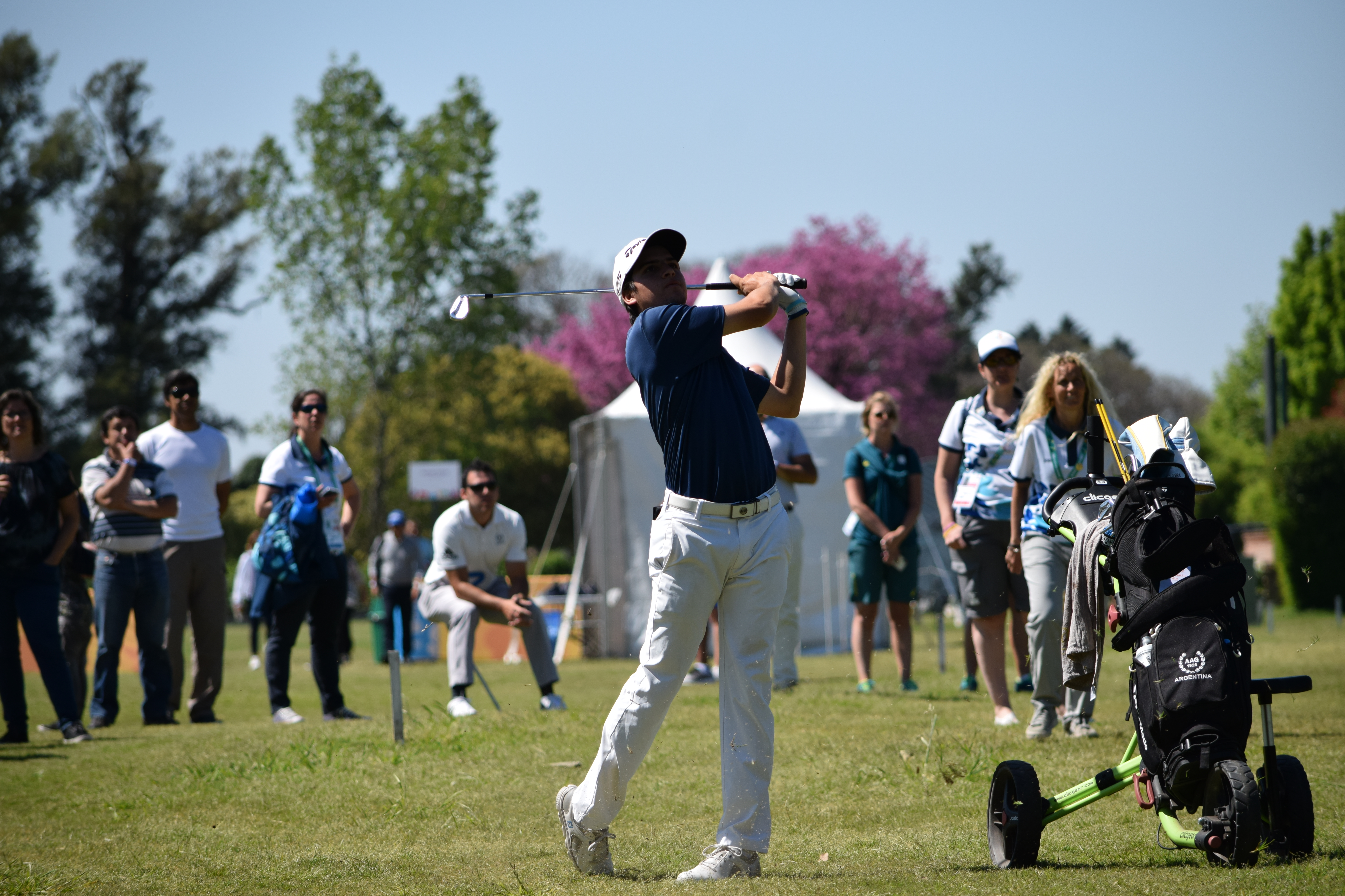 Tercera ronda de golf en equipos mixtos durante los Juegos Olímpicos de la Juventud 2018 en Buenos Aires. Mateo Fernández de Oliveira.